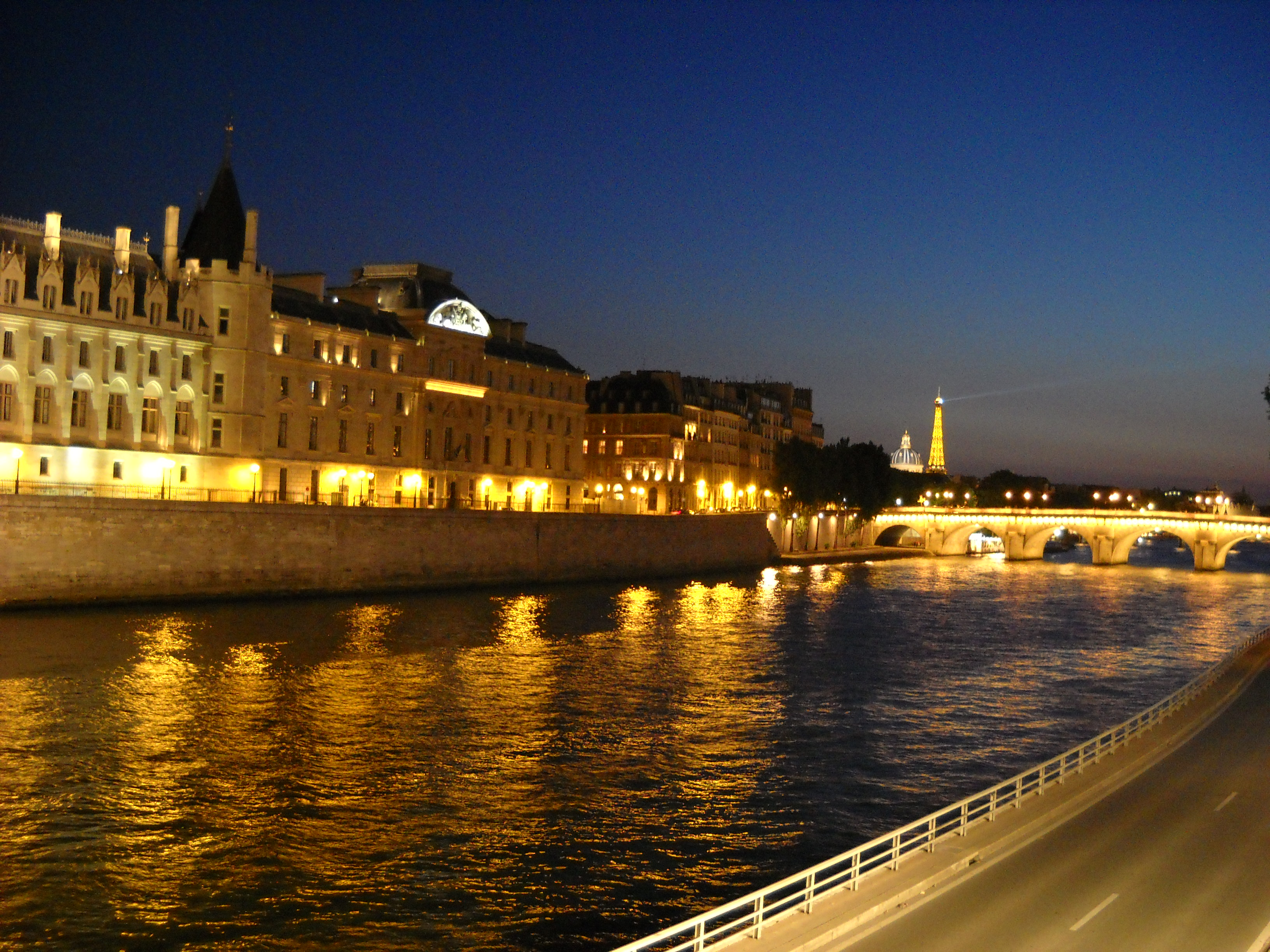 Seine de la Tour Eiffel